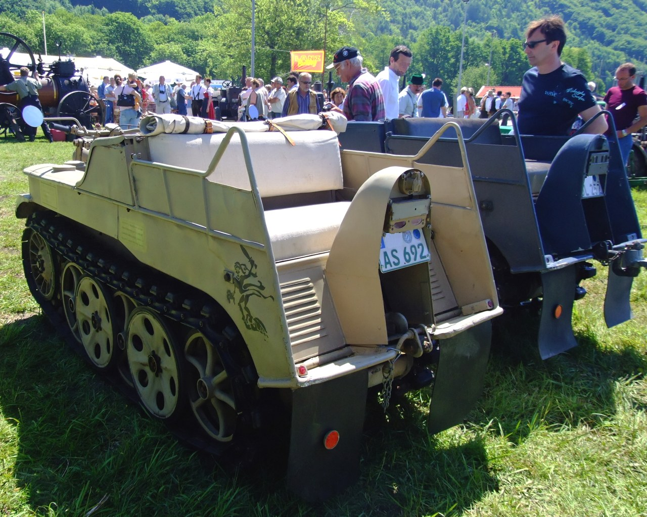 NSU Kettenkrad Typ HK 101 36 PS 4 Zylinder 70 km/h 1235 kg Eigengewicht Motor: Opel Olympia 1500ccm Steigfähigkeit: 48 Grad gebaute Stückzahl: 8345 Stück Quelle: selbst fotografiert, 05/2007 Fotograf: Späth Chr.